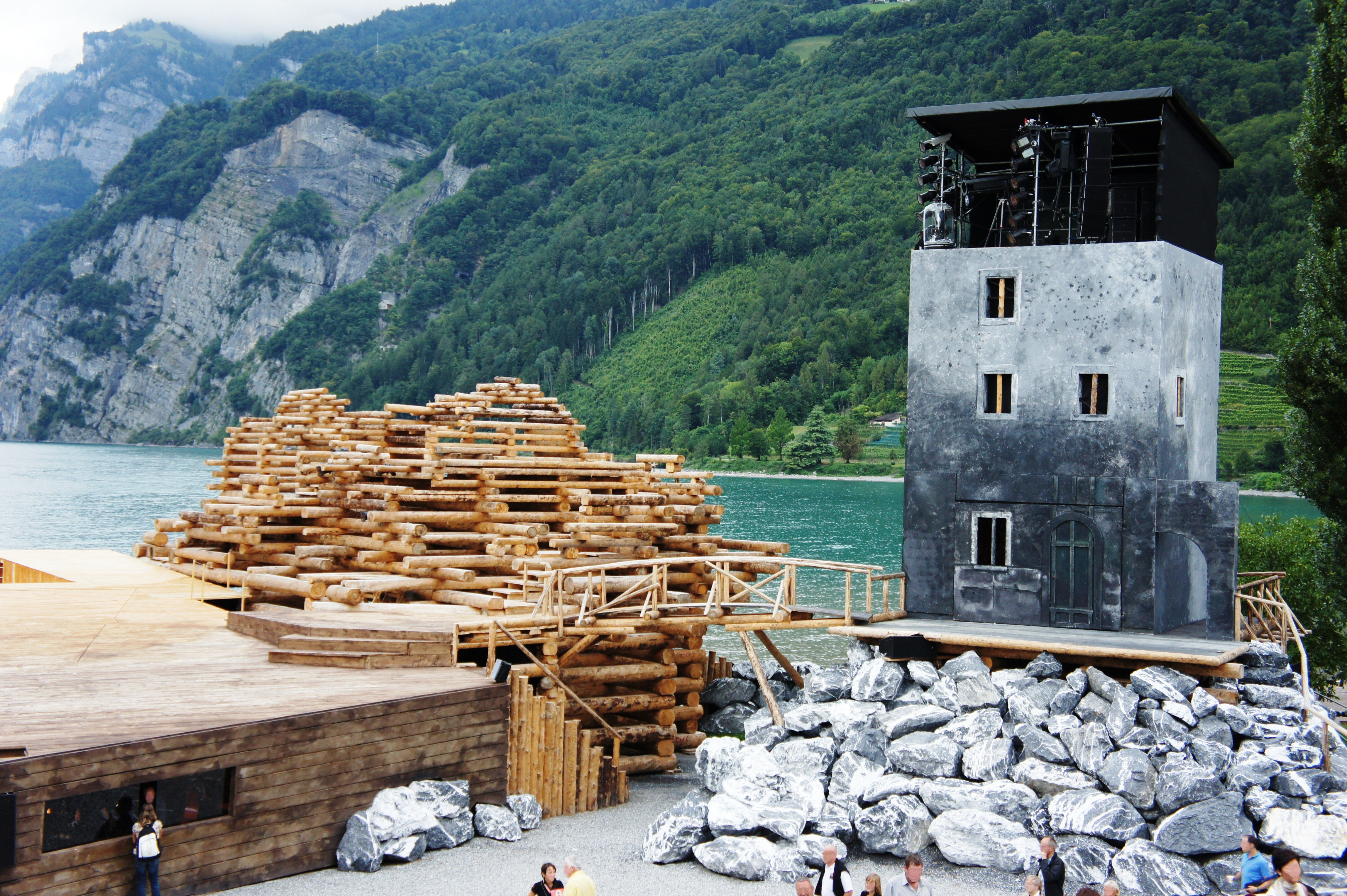 Die Walensee-Bühne (linker Teil) für Tell - Das Musical vor der Aufführung.